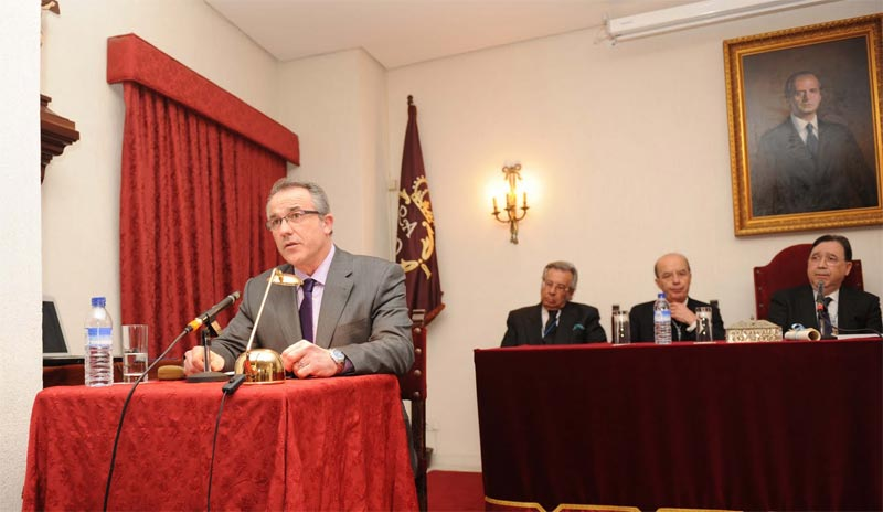 Ingreso del académico José Luis Jiménez García. Foto del autor.